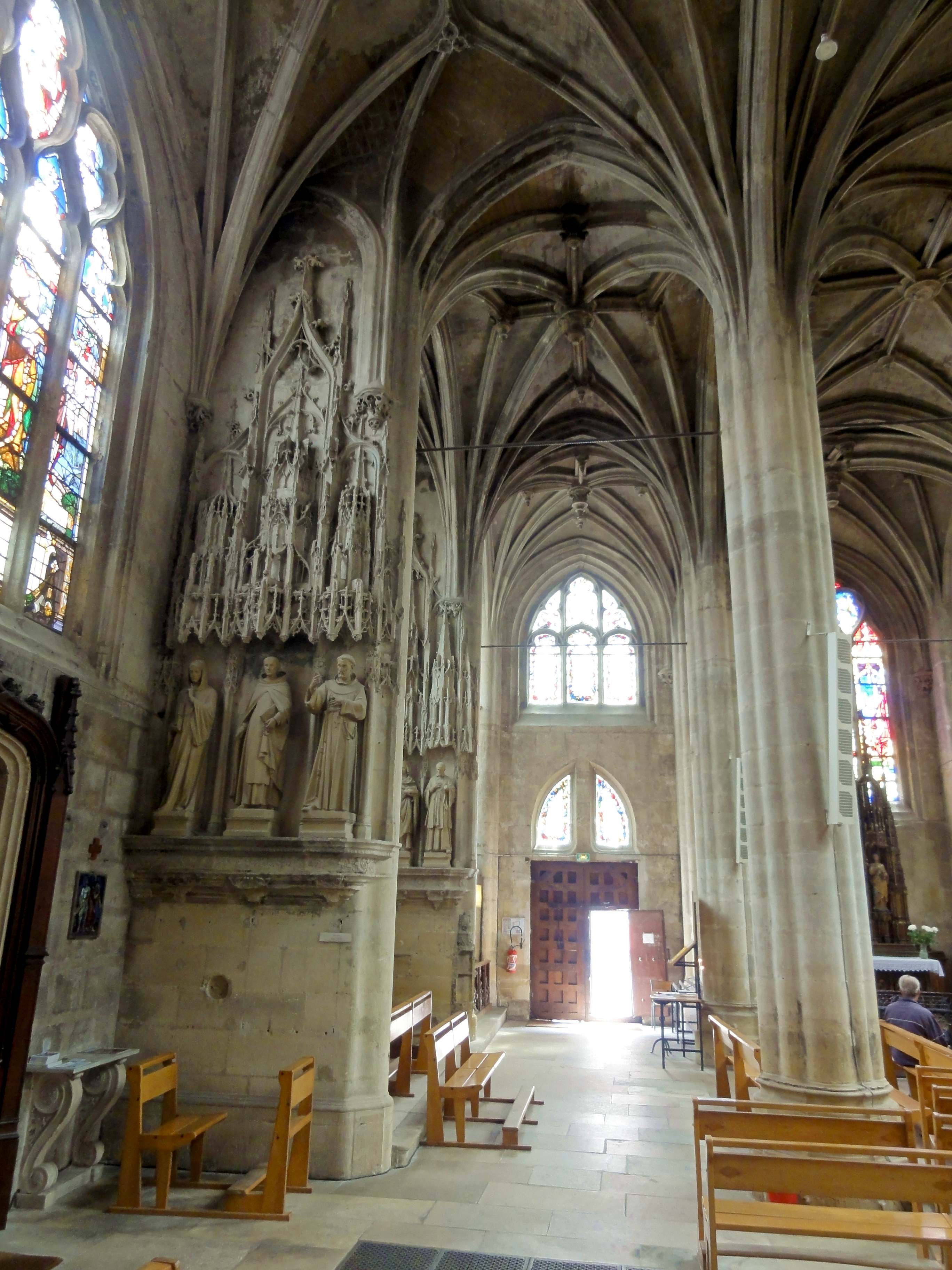 Voir titre.